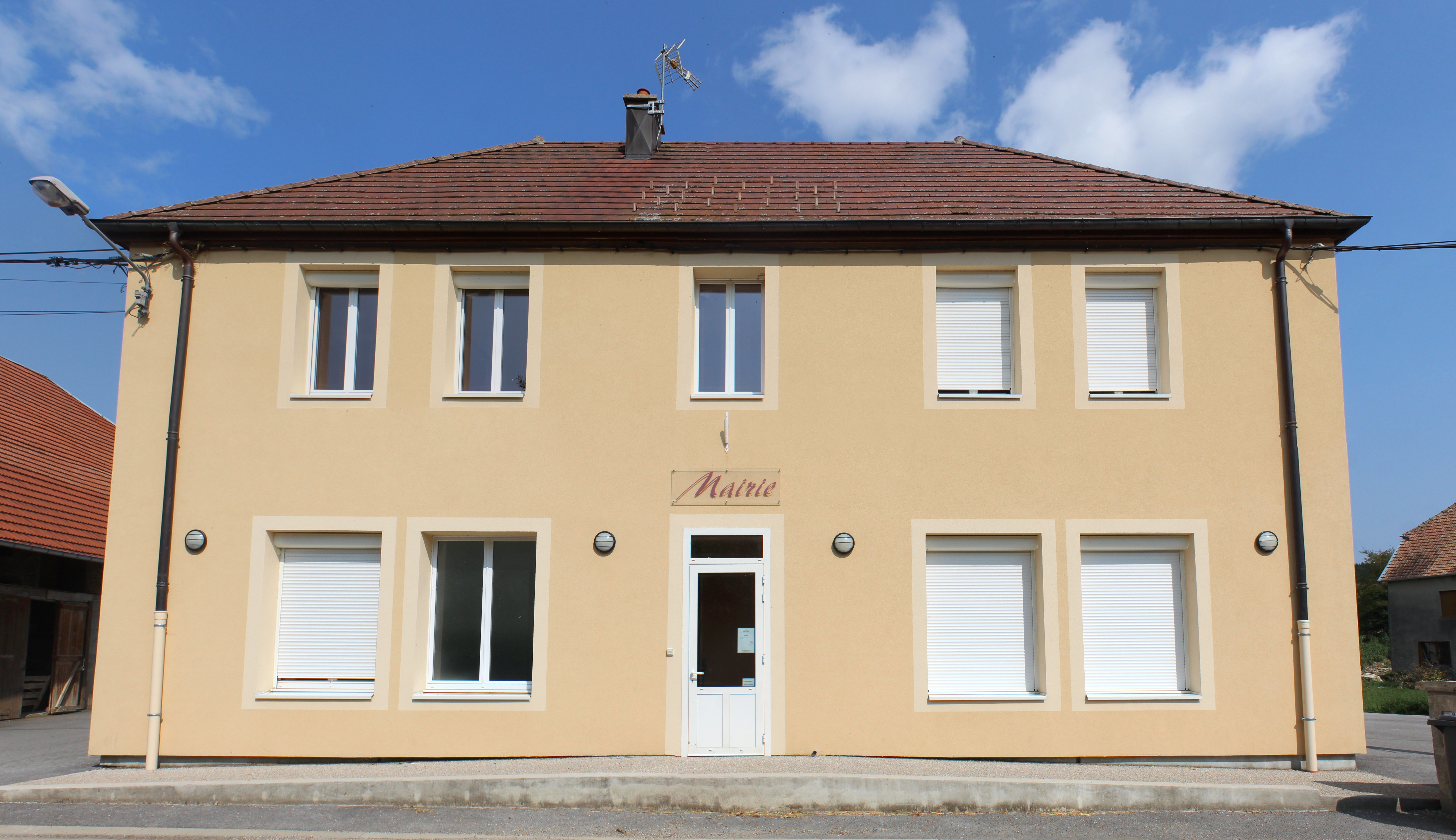 Mairie de Saizenay.